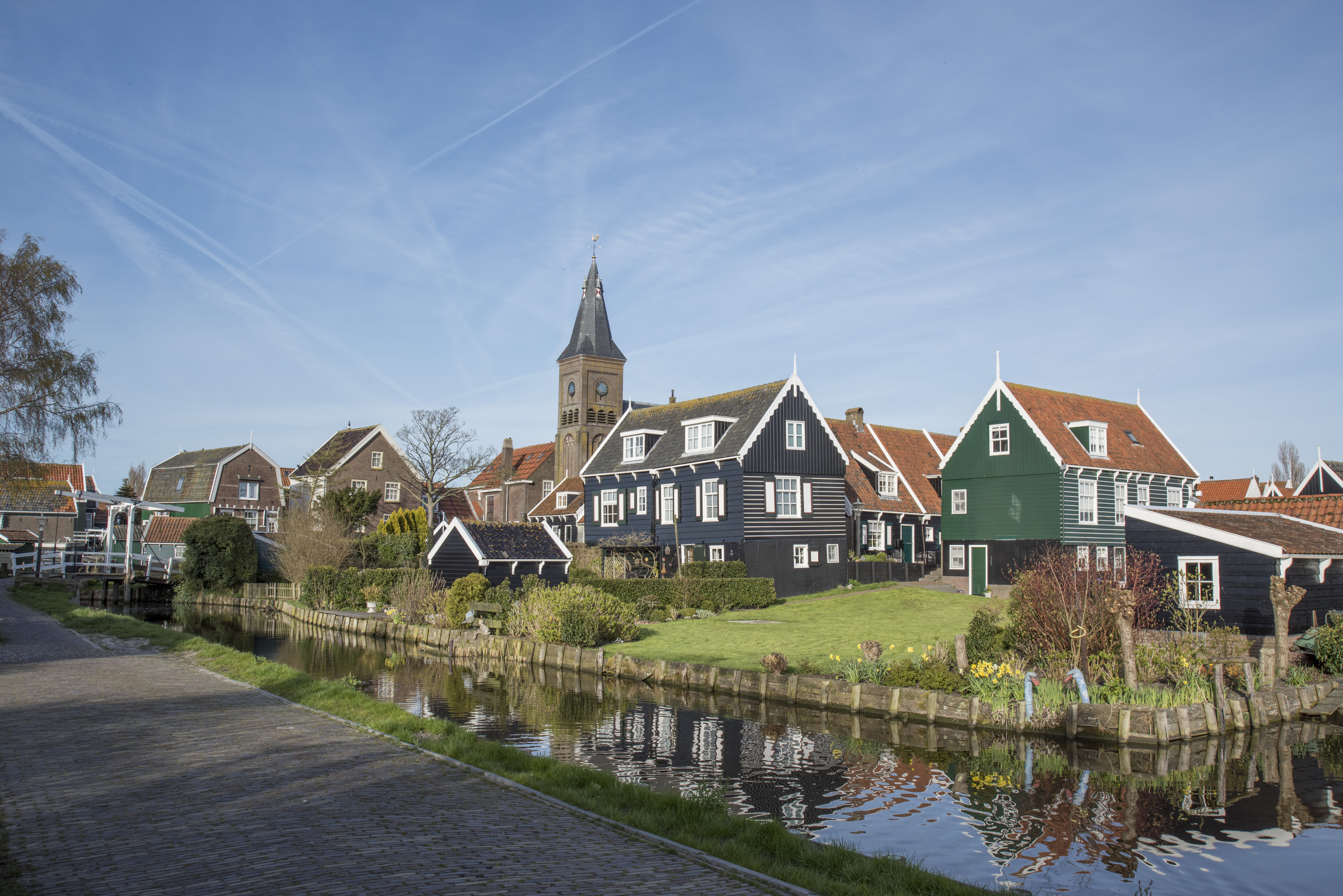 Kerkbuurt Marken 2015